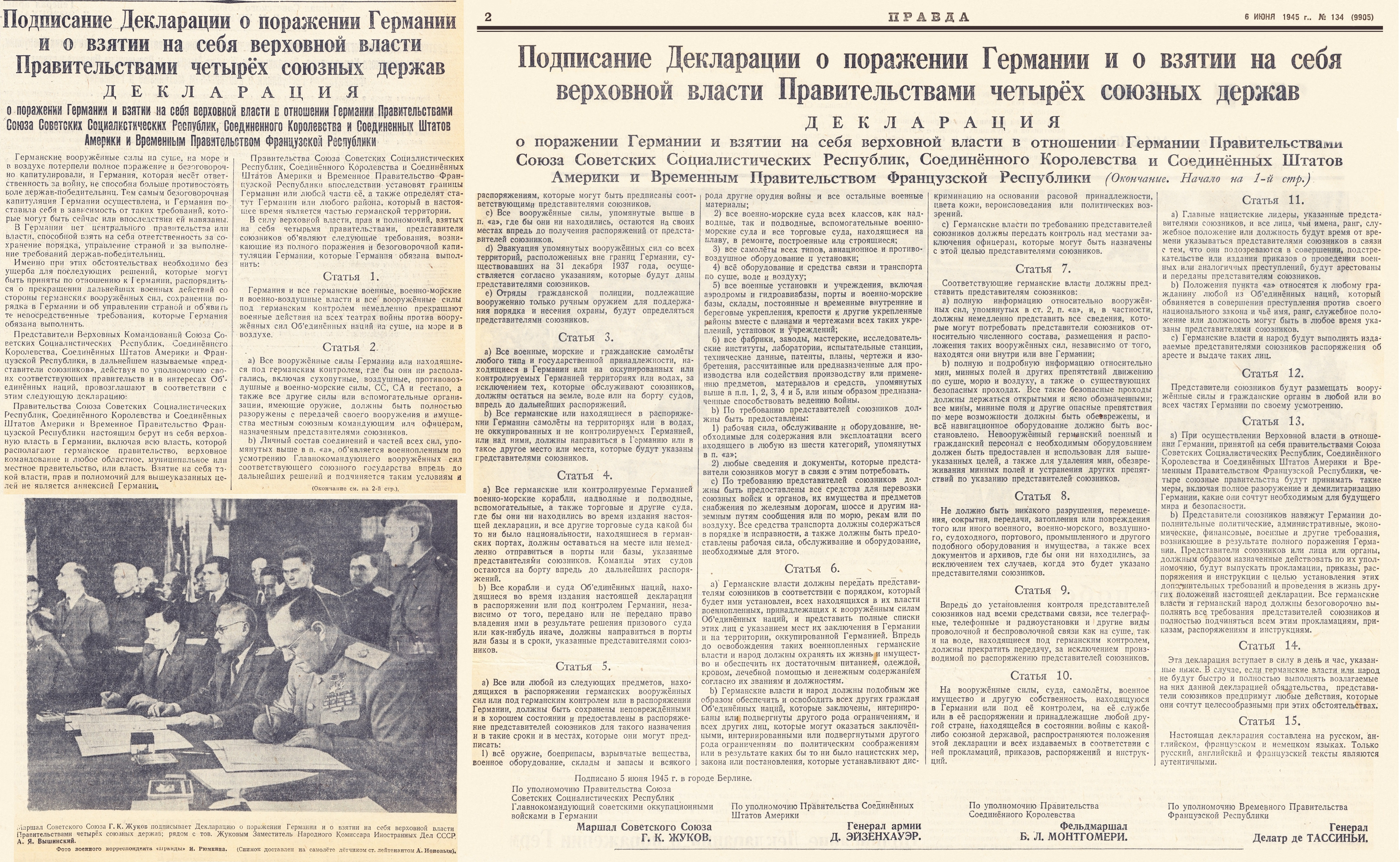 Газета "Правда" от 6 июня 1945 года с текстом Декларации о поражении Германии.